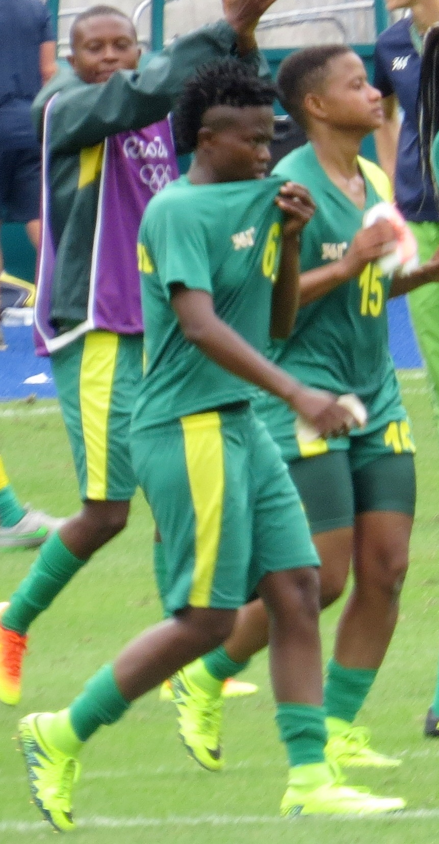 Futebol feminino Suécia 1 x0 Africa do Sul 03/08/16